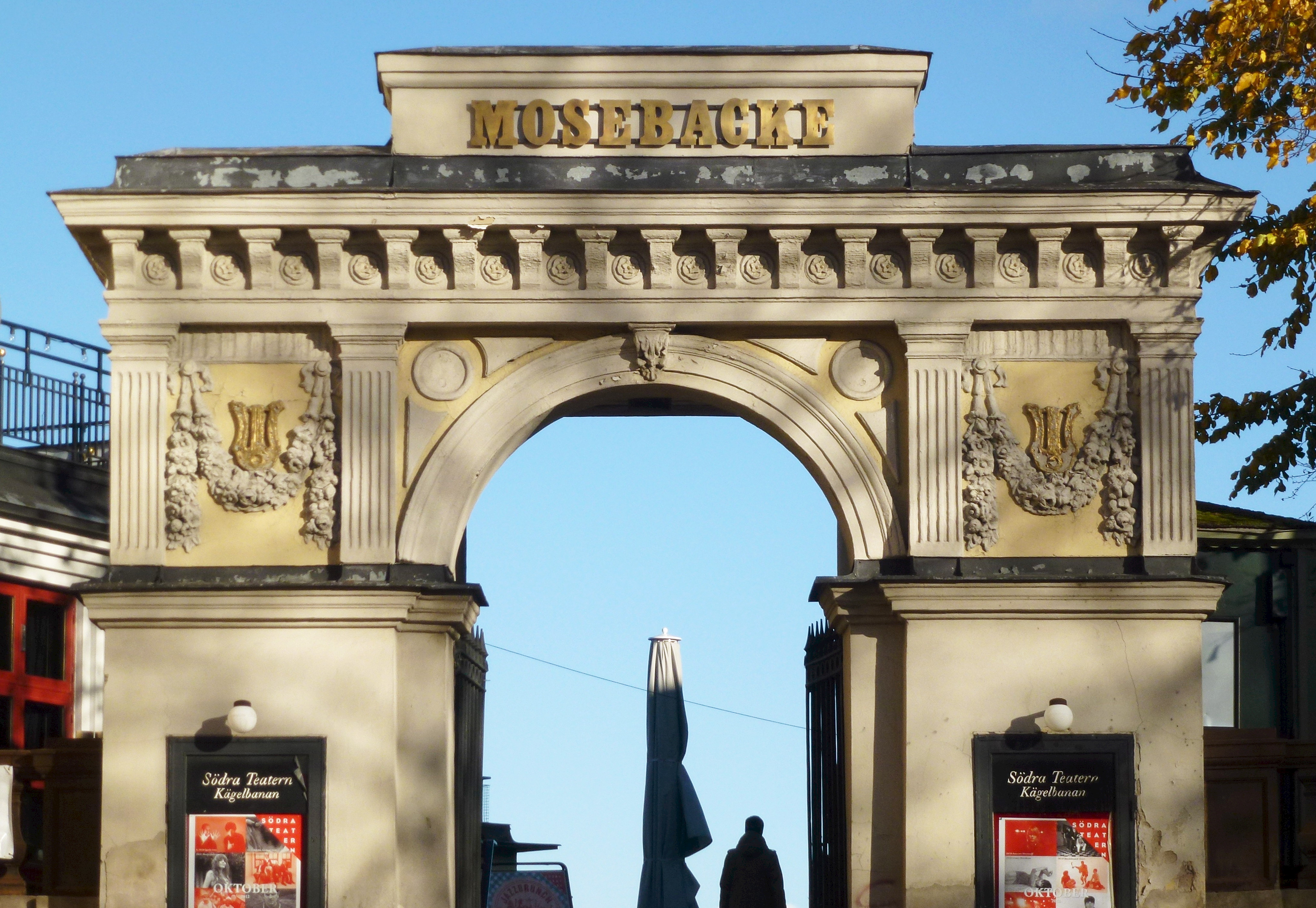 Portalen in till Mosebacke Terrass